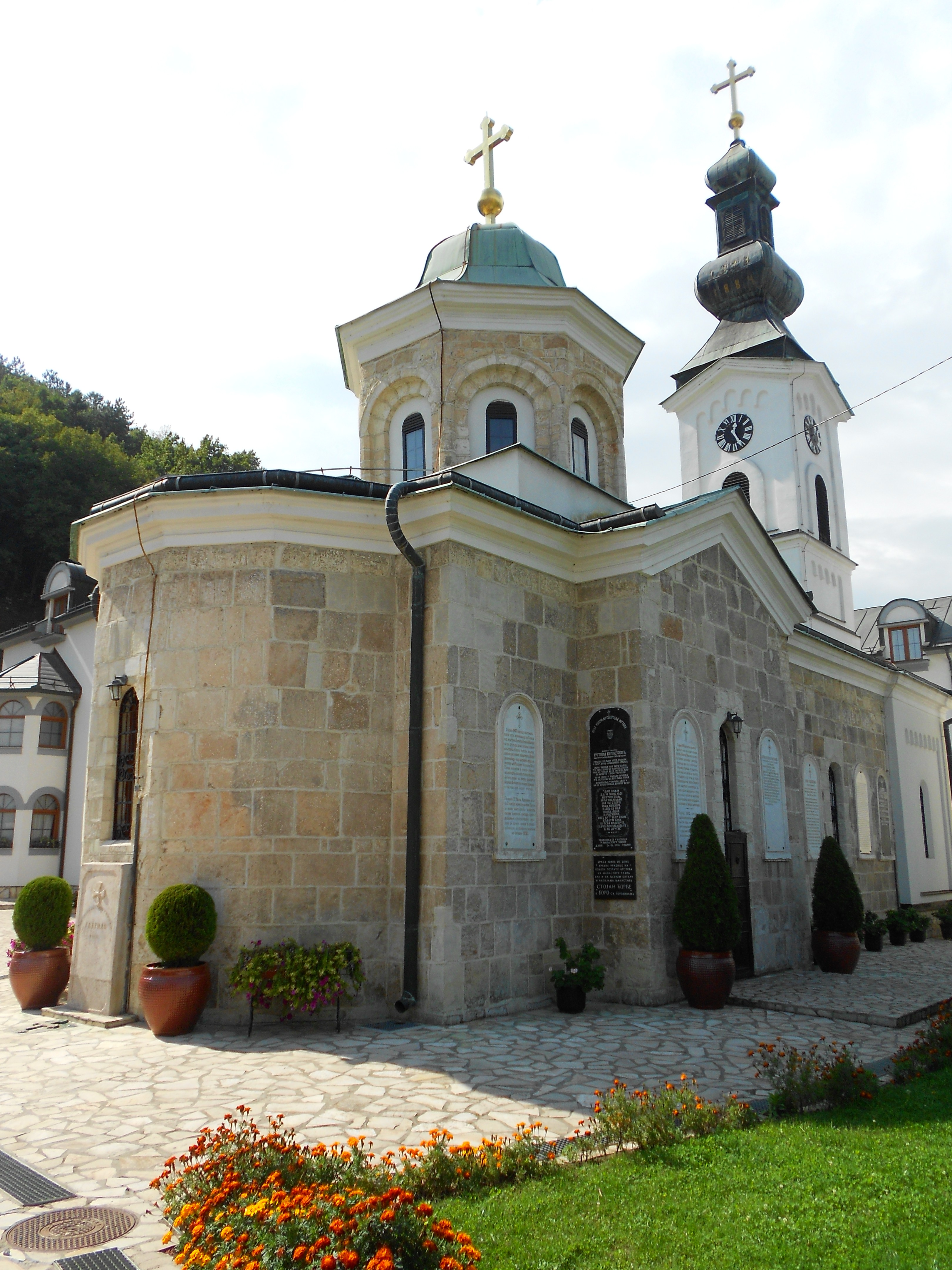 Црква св.Тројице (црква манастира Тавна), Тавна, Бијељина ID добра: NKD221